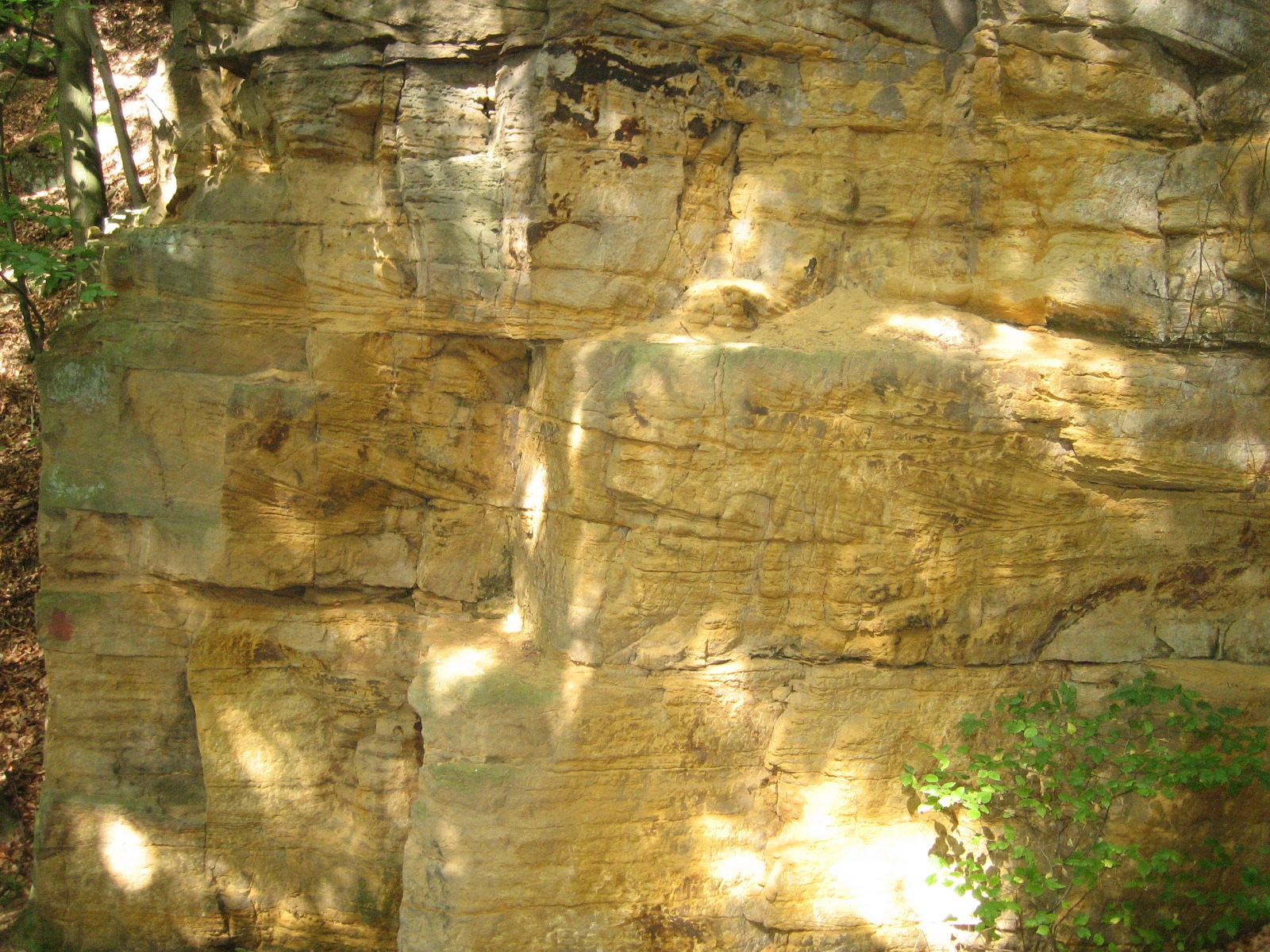 Lëtzebuerger Sandsteen, bei Bäerdref.